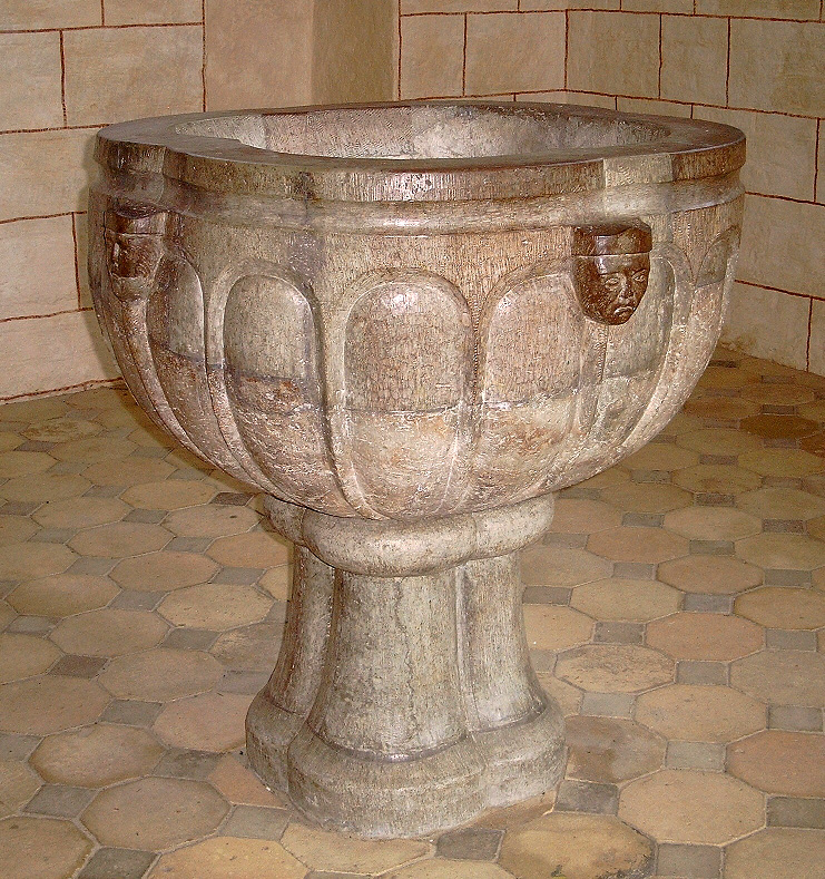 St.-Nikolai-Kirche in Burg (Fehmarn). Steintaufe aus Gotländer Sandstein aus dem Übergang von der Romanik zur Gotik. Der Fuß wurde ersetzt.